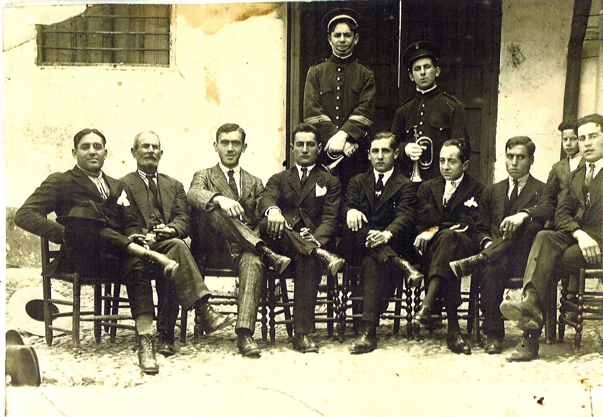 Junta de Gobiernos de la Hdad de los Dolores, 1927